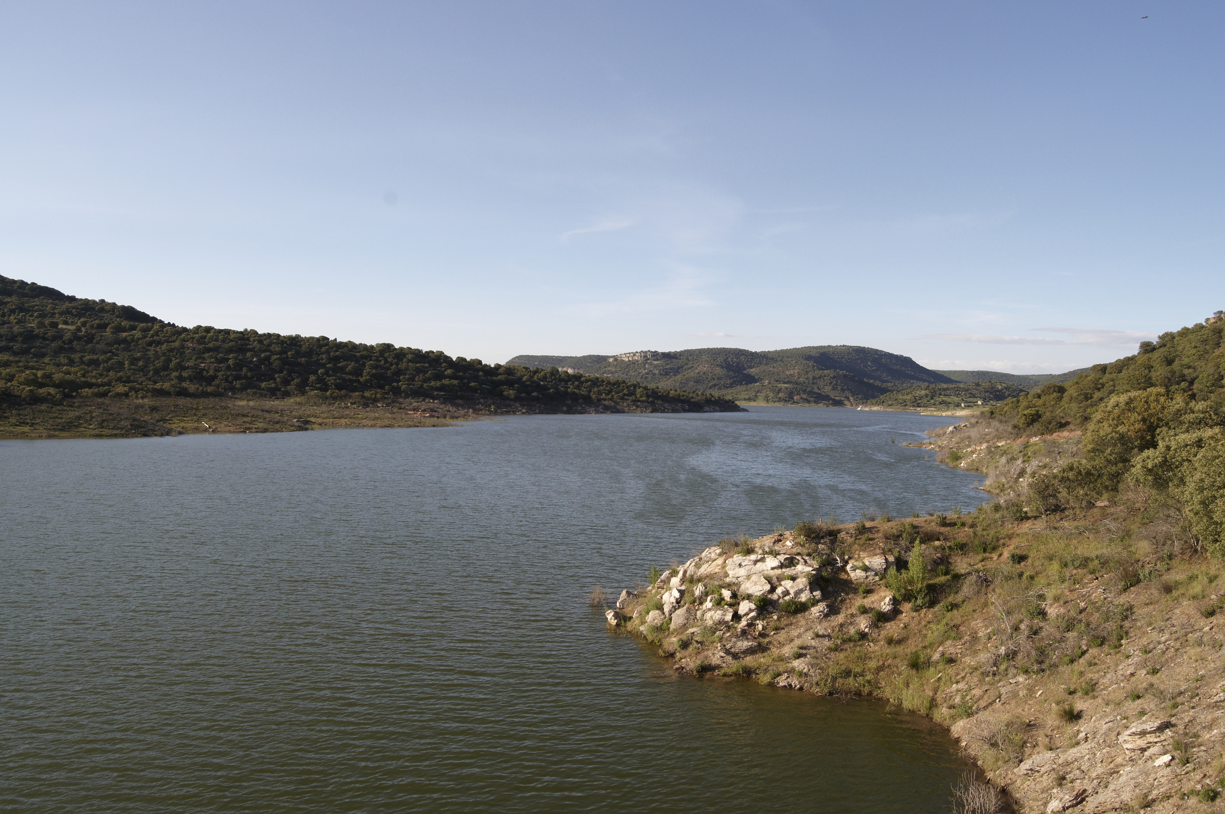 Pantano del Atance